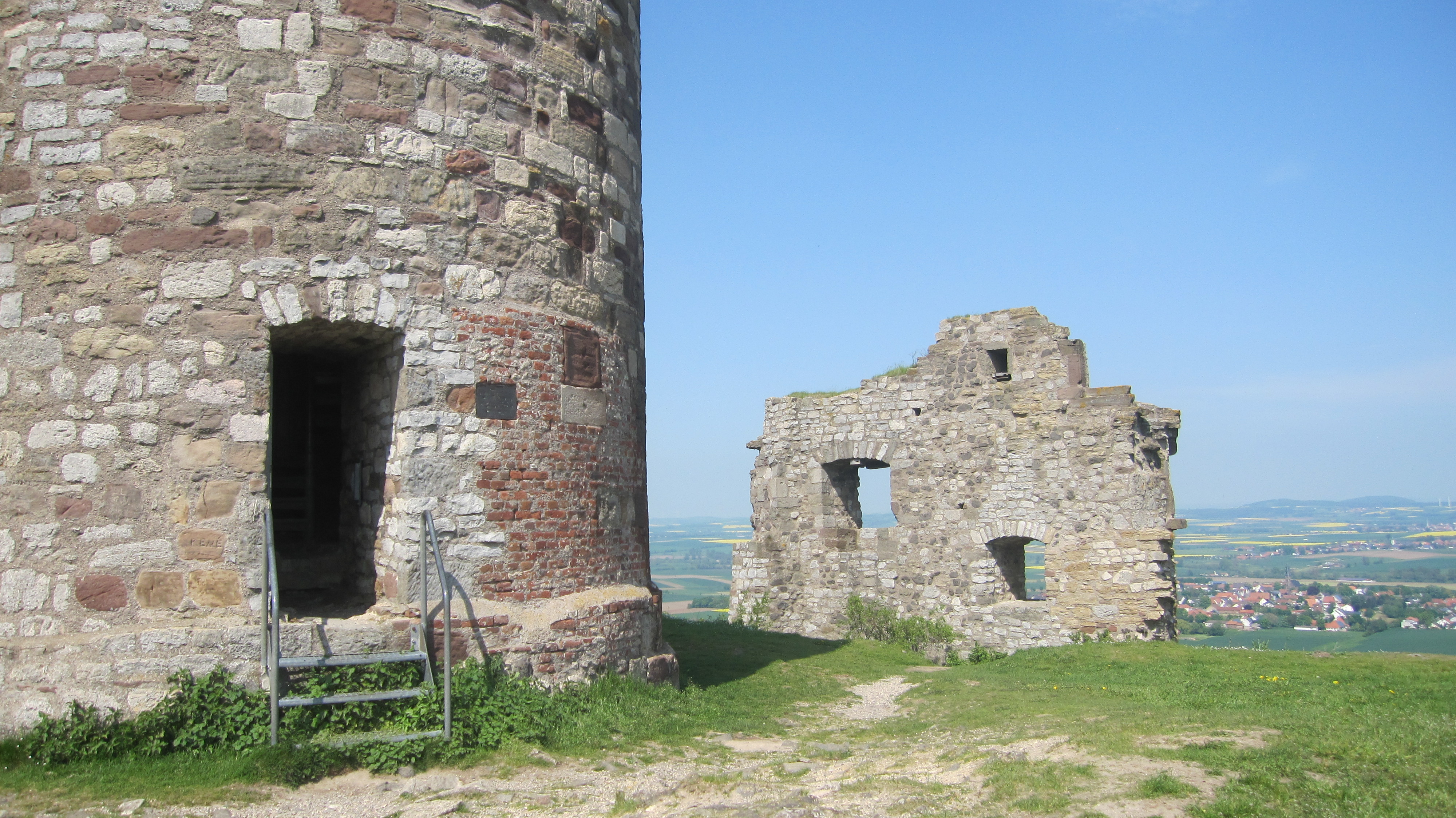 Bergfried und Mauerstück der Ruine Burg Desenberg auf dem Desenberg bei Warburg.